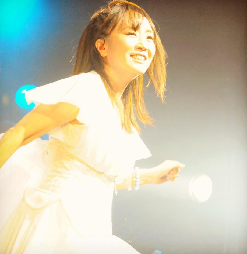 Concert Masami Okui 2018 in Japan